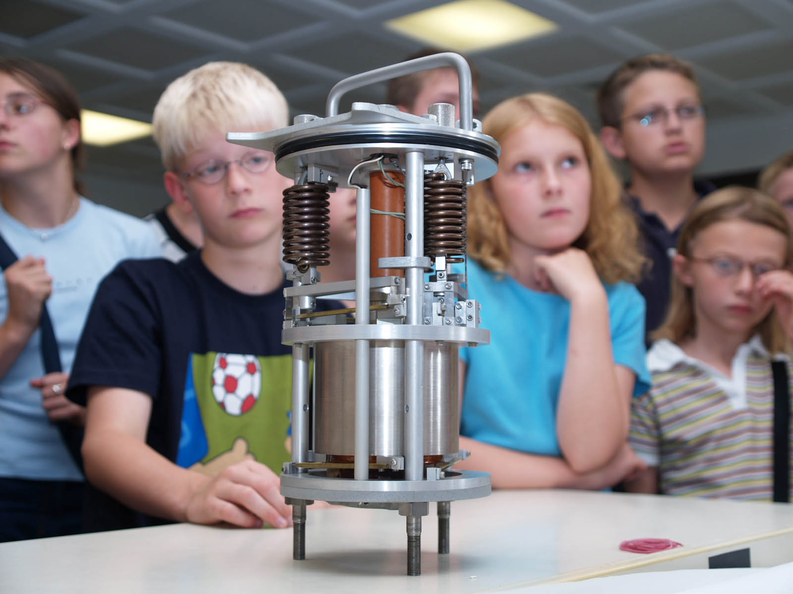 Seismometer Innenaufnahme, Vorführung bei einer Ferienpassaktion